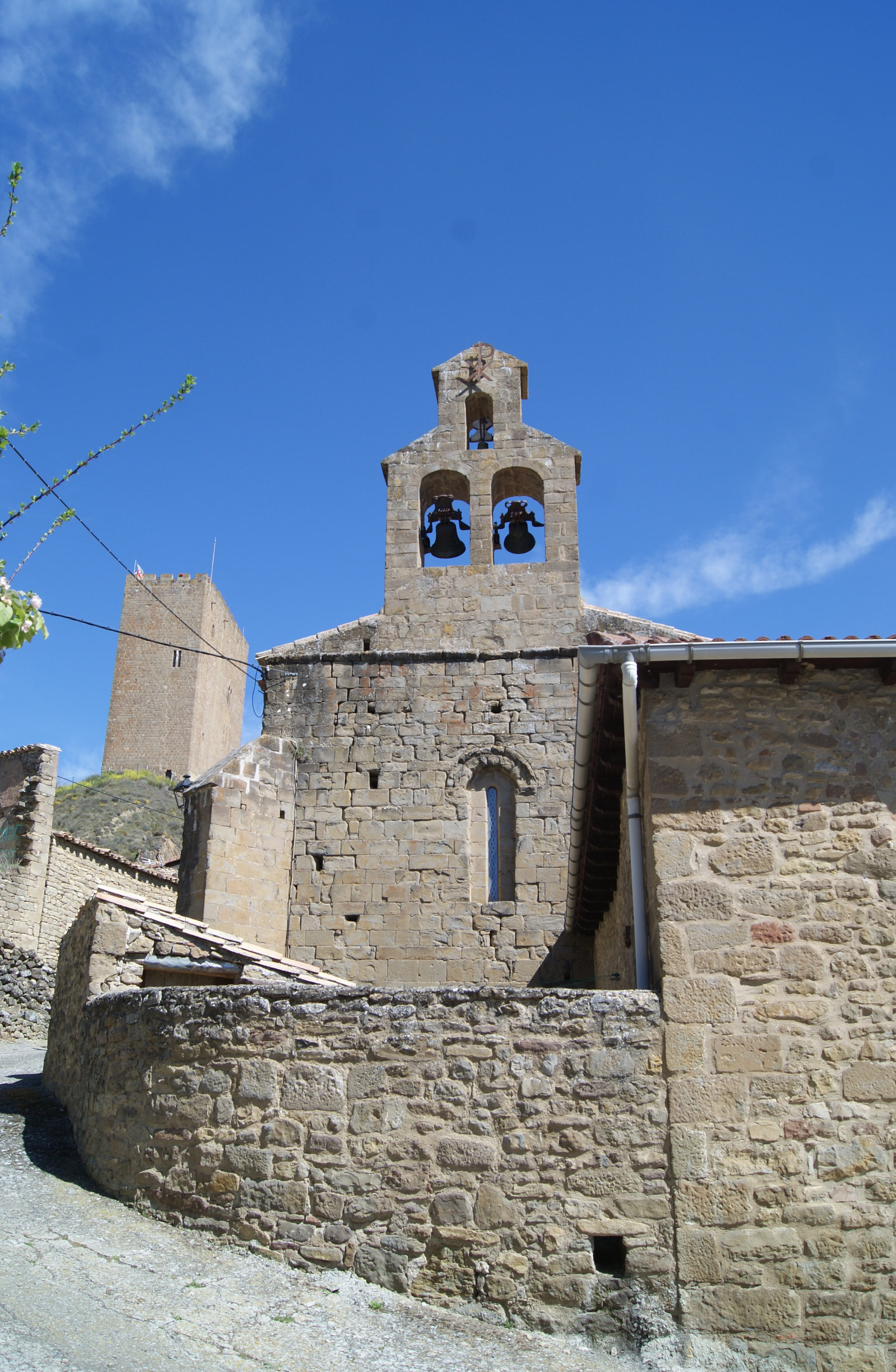 Iglesia de Navardún (Zaragoza) - Vista frontal con el torreón al fondo